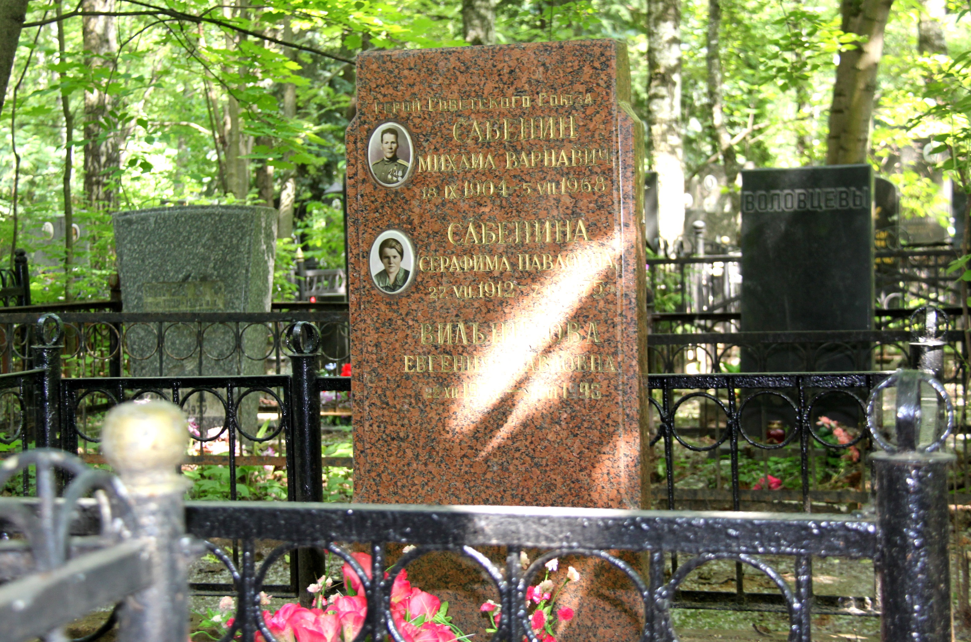 Надгробный памятник Героя Советского Союза Сабенина Михаила Варнавича на Котляковском кладбище